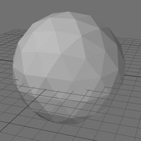 Ein Polyeder dessen Bildsynthese mittels eines Flat-Shading Algorithmus erfolgt ist. Siehe Interpolative Shading-Techniken.